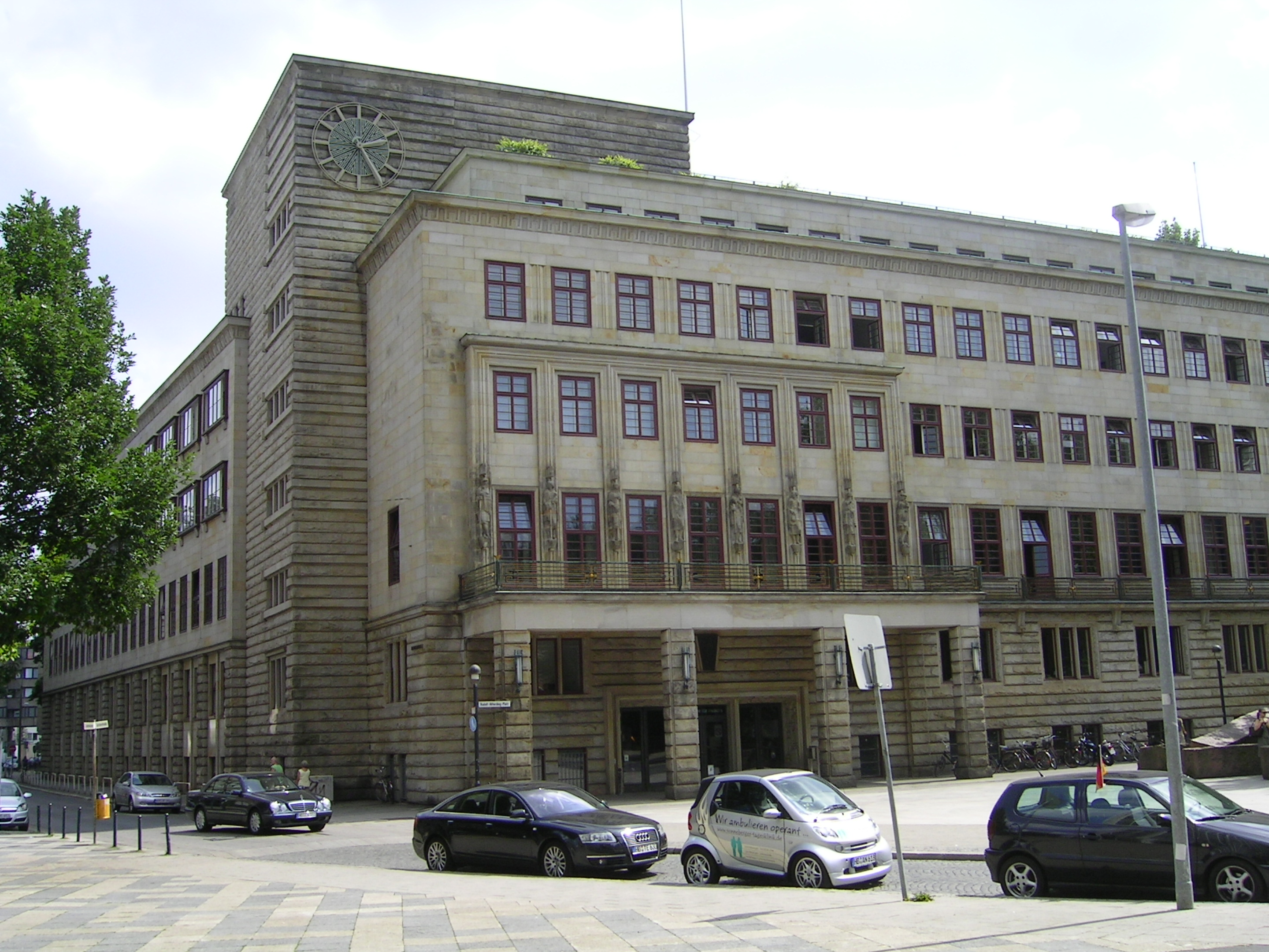 "der senator fur finanzen" building in Bremen City Das abgebildete Objekt ist ein geschütztes Kulturdenkmal in der Freien Hansestadt Bremen, mit der Nr. 0290 beim Landesamt für Denkmalpflege registriert.